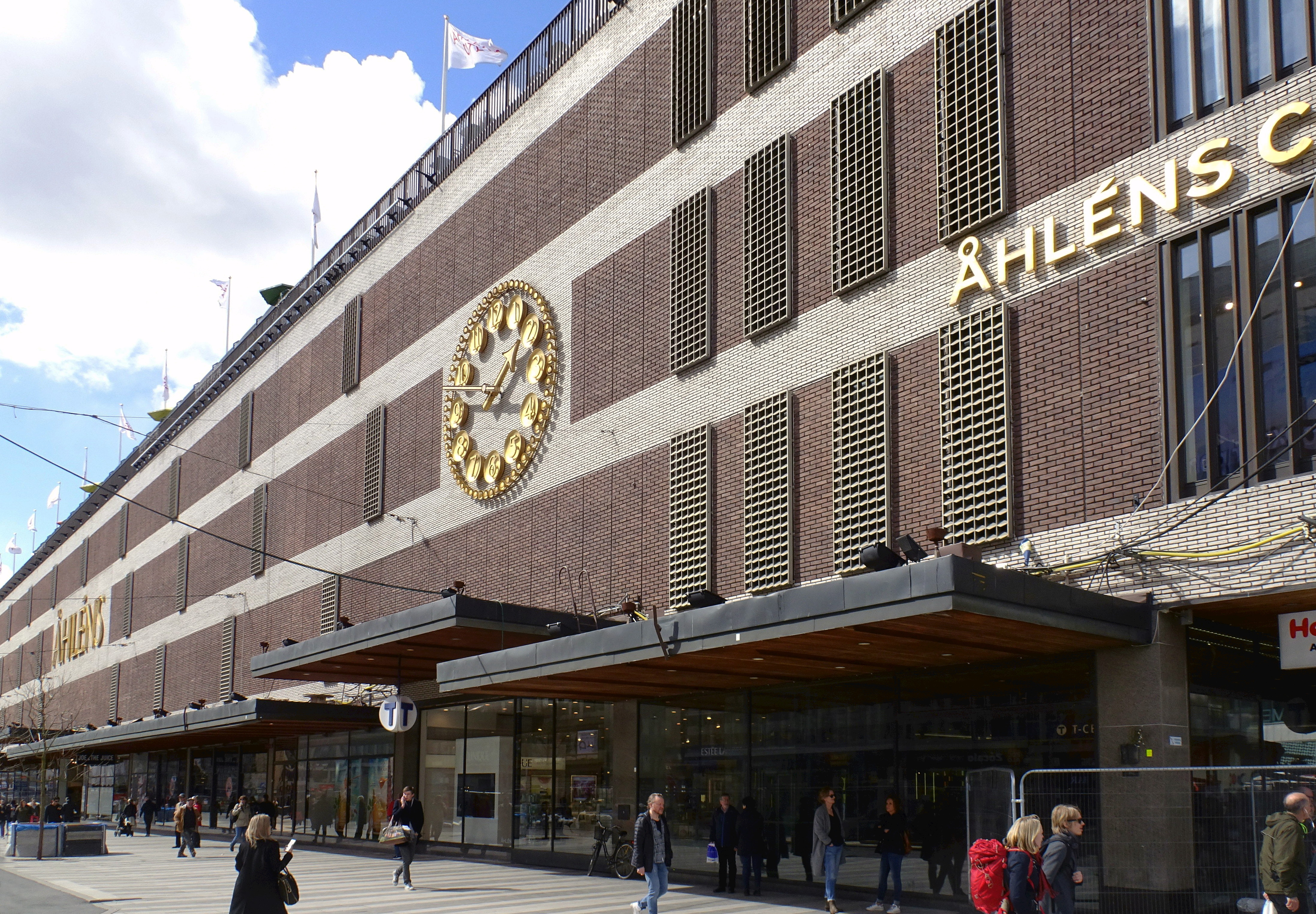 Åhléns City fasad mot Karabergsgatan